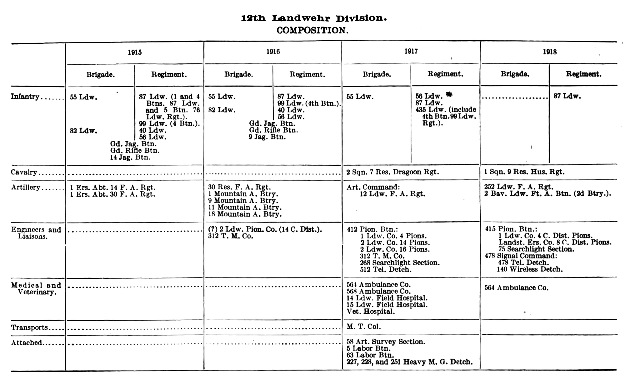 Gliederung 12. Landwehr-Division 1914-18